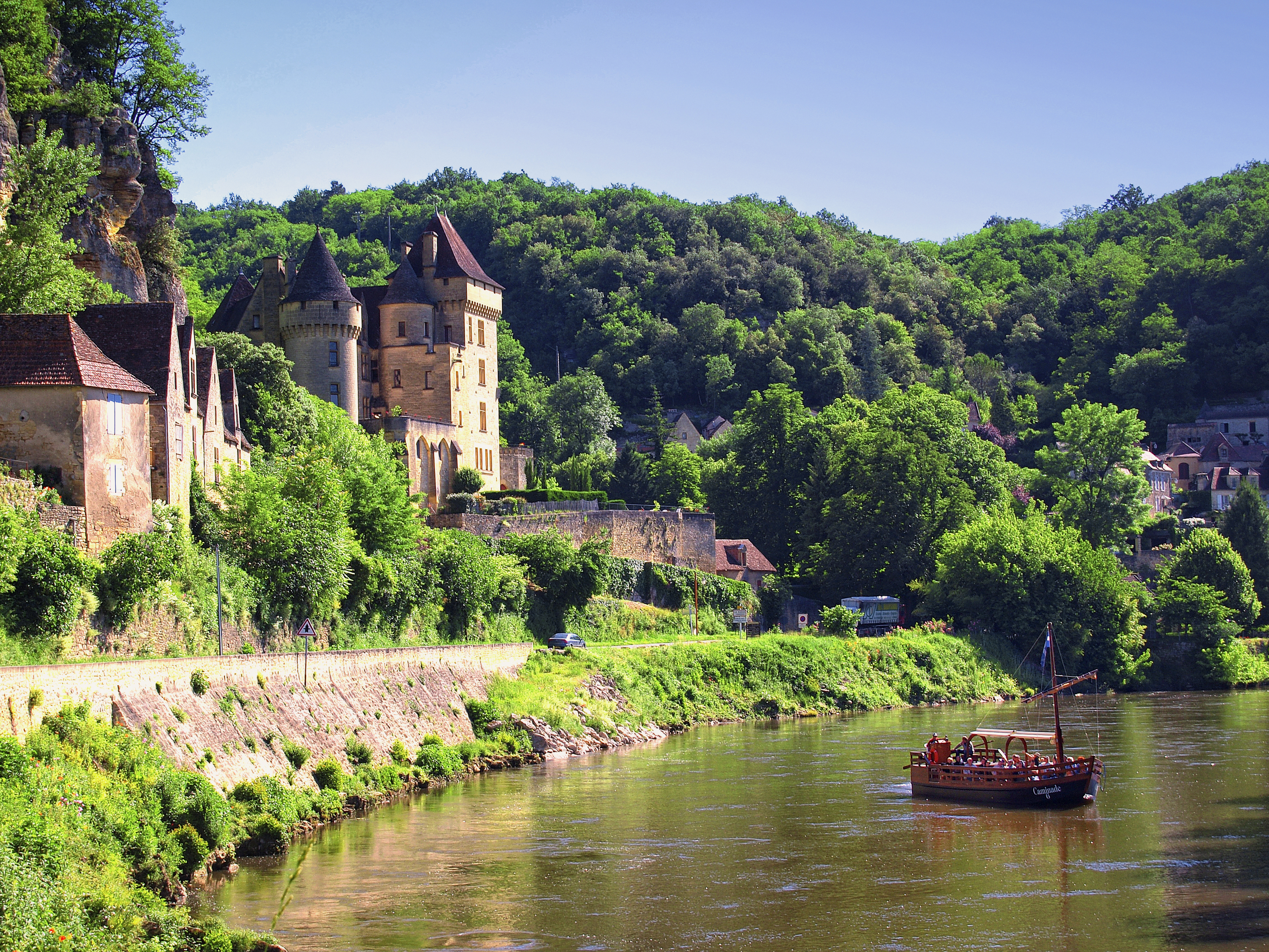 Vézac - Château de la Malartrie au bord de la Dordogne